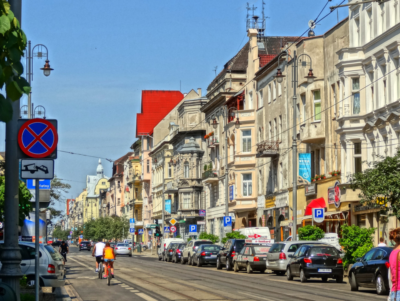 Ulica Gdańska w Bydgoszczy na odcinku między ul. Dworcową, a ul. Śniadeckich